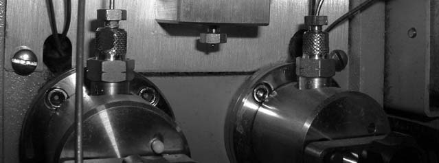 HPLC Pump.